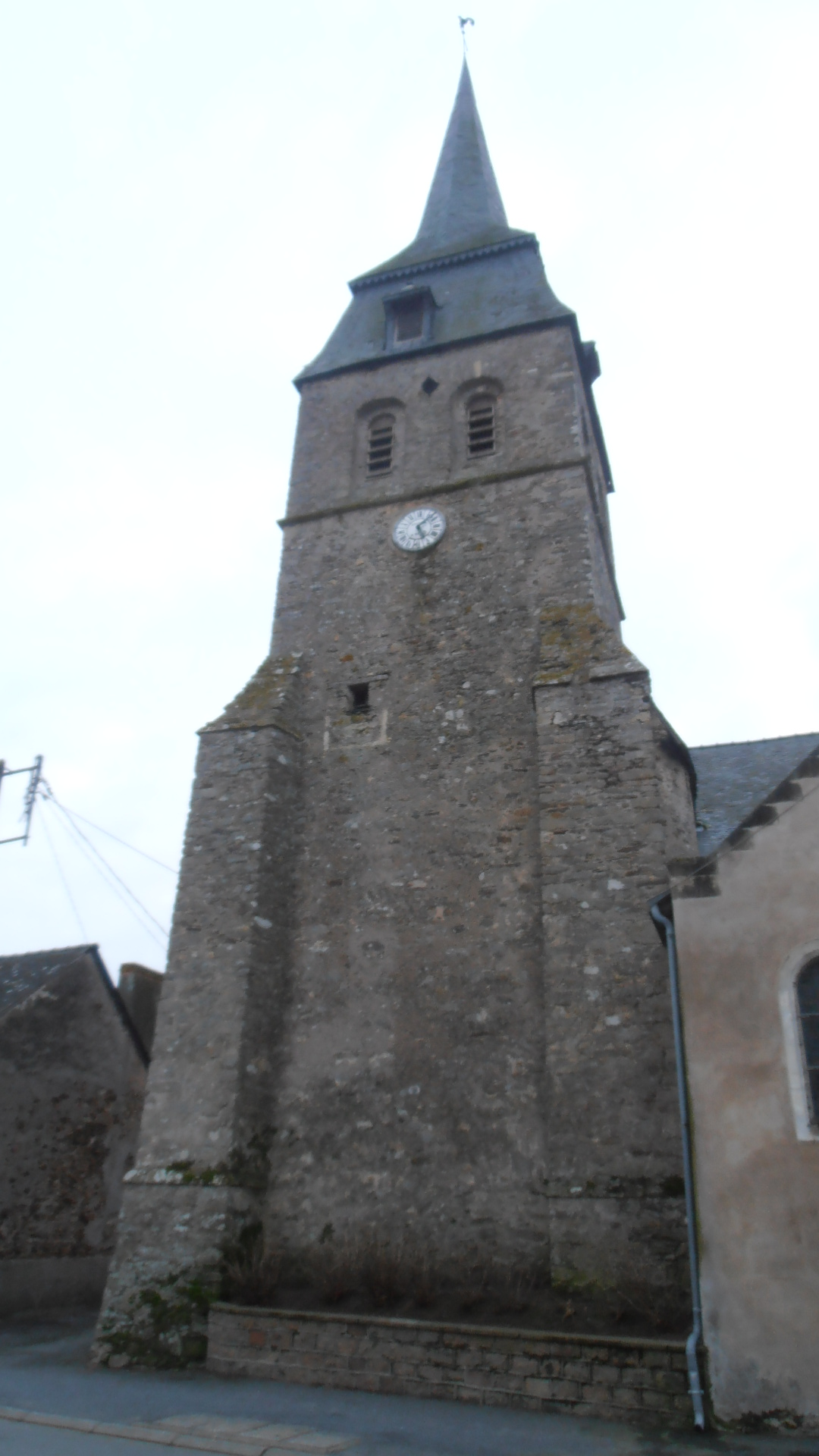 l'église de cherré (49)